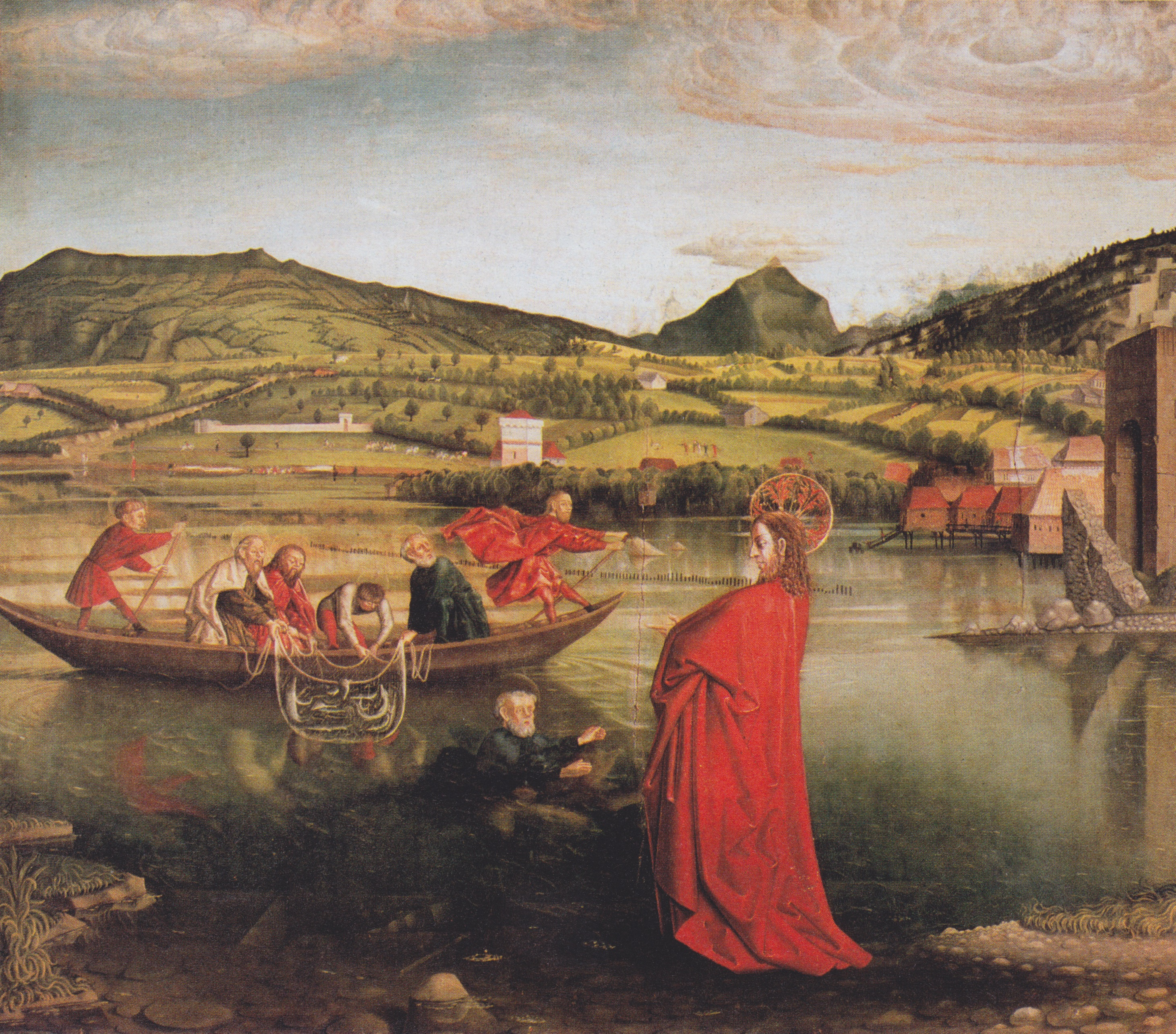 Peter's altar table